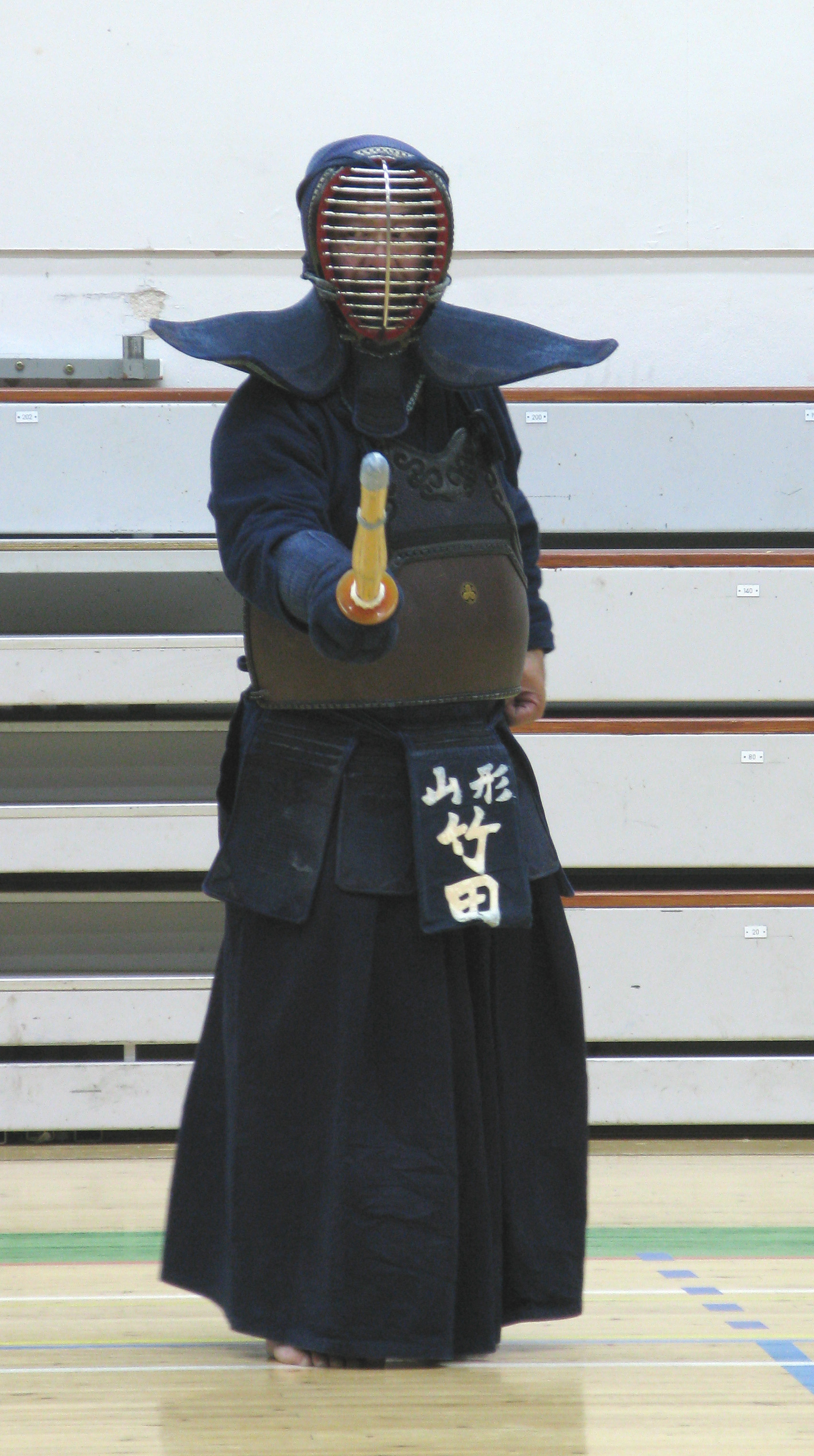 Tankendon chudan no kamae valmiusasento